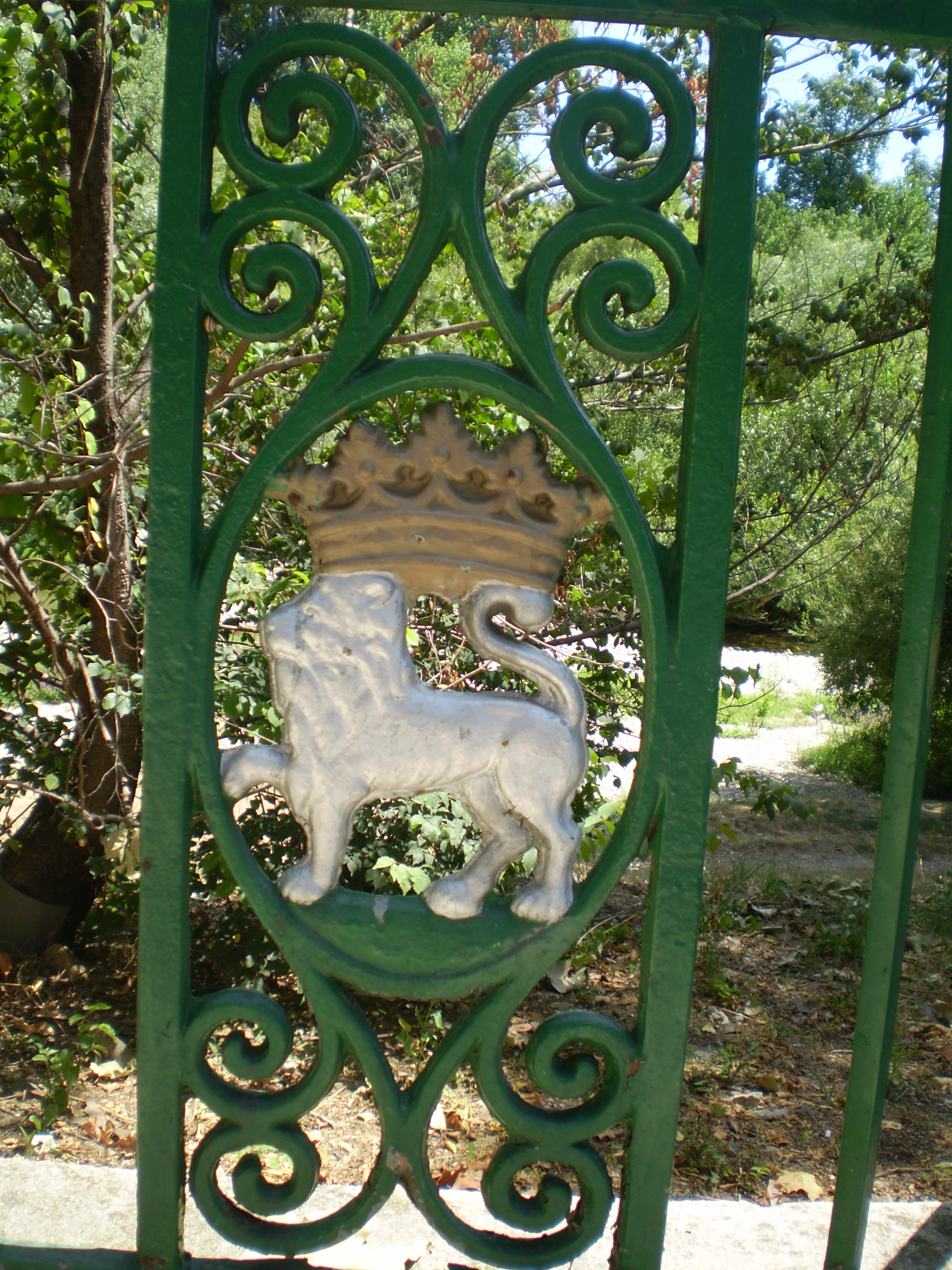 Tradicional adorno de las vallas de la ciudad de Pamplona con los elementos principales de su escudo león pasante de plata armado y lampasado de gules coronado de oro. Estas vallas fabricadas por la Casa Sancena están repartidas por toda la ciudad.